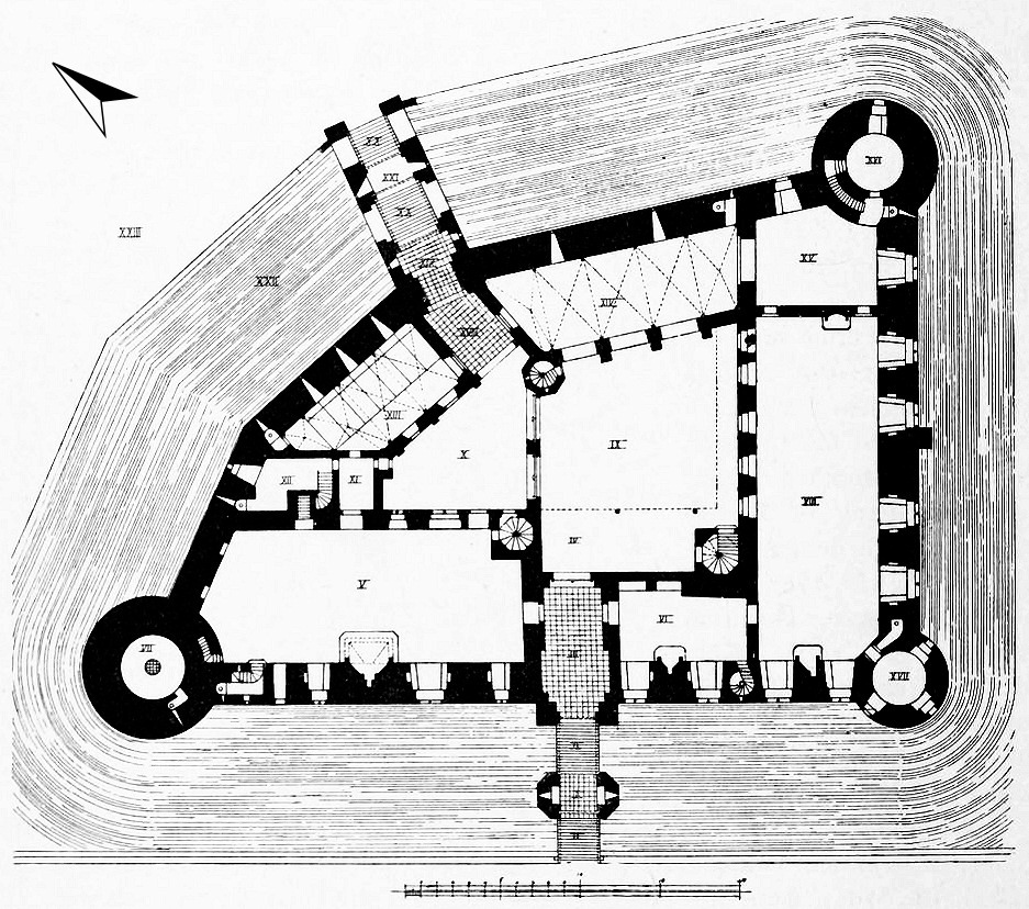 Grundriss der rekonstruierten Burg Kempen